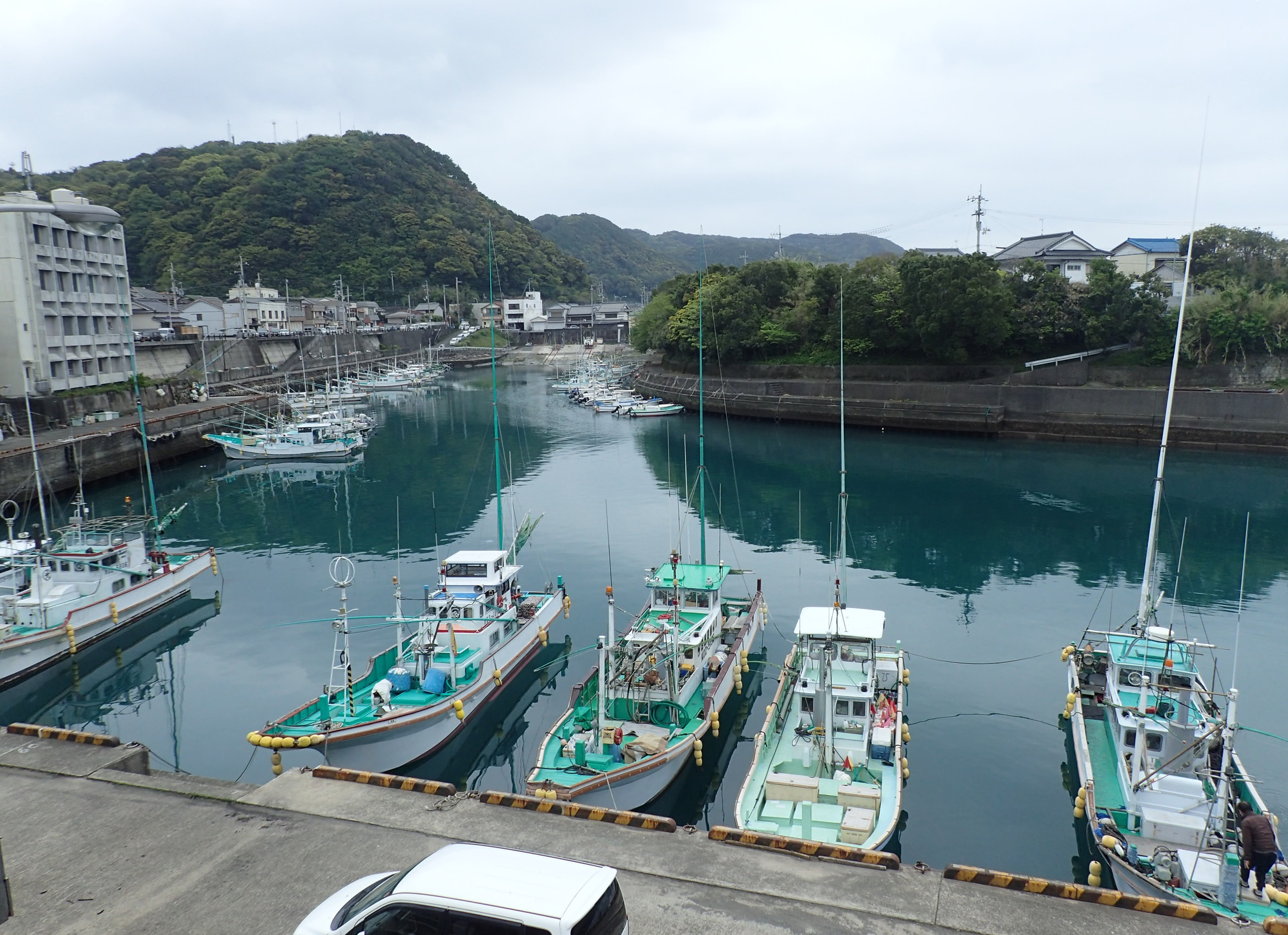 室戸岬付近の港は南海トラフ巨大地震毎に隆起し掘削が繰り返された。